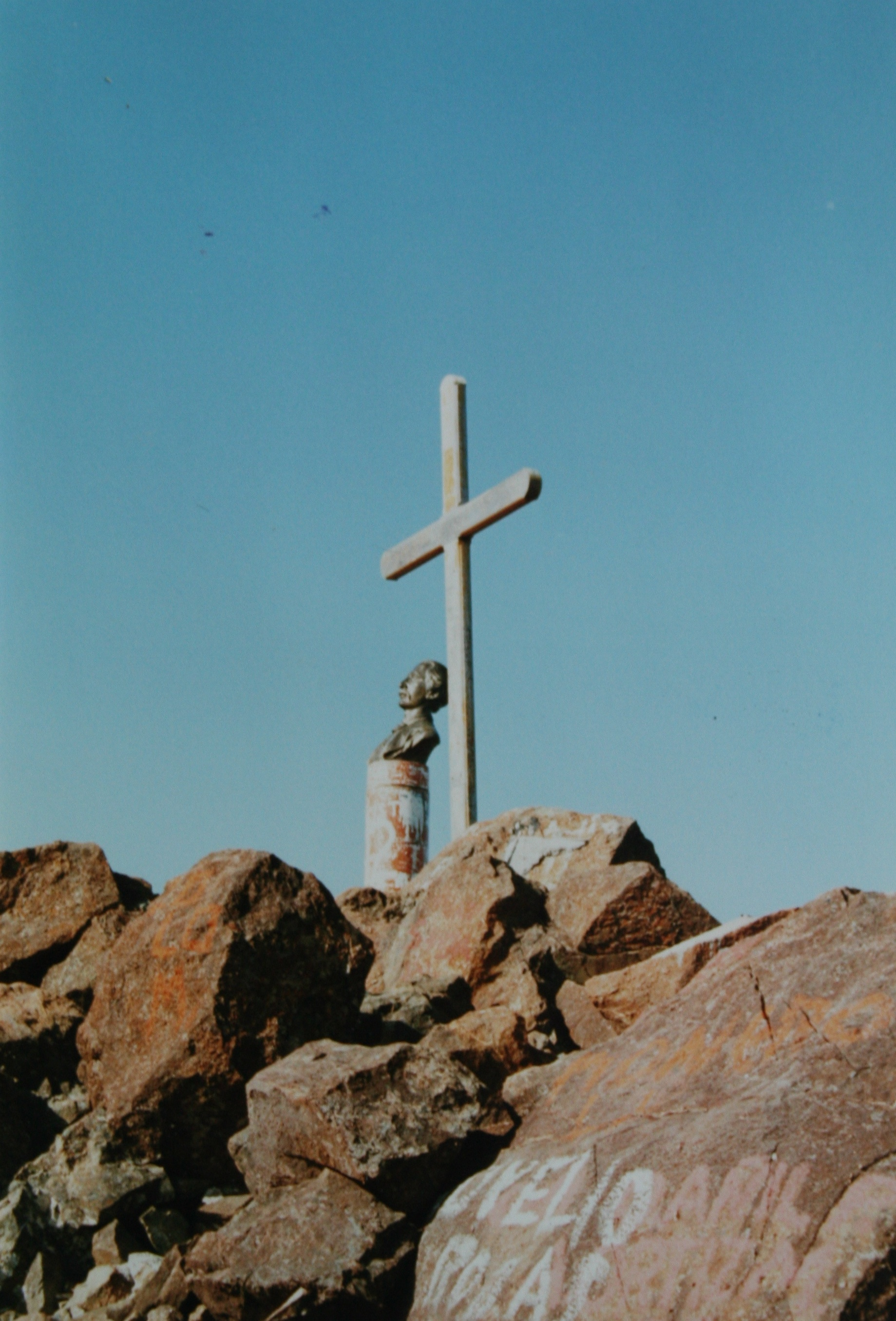 Pico Duarte in der Dominikanischen Republik, 1986